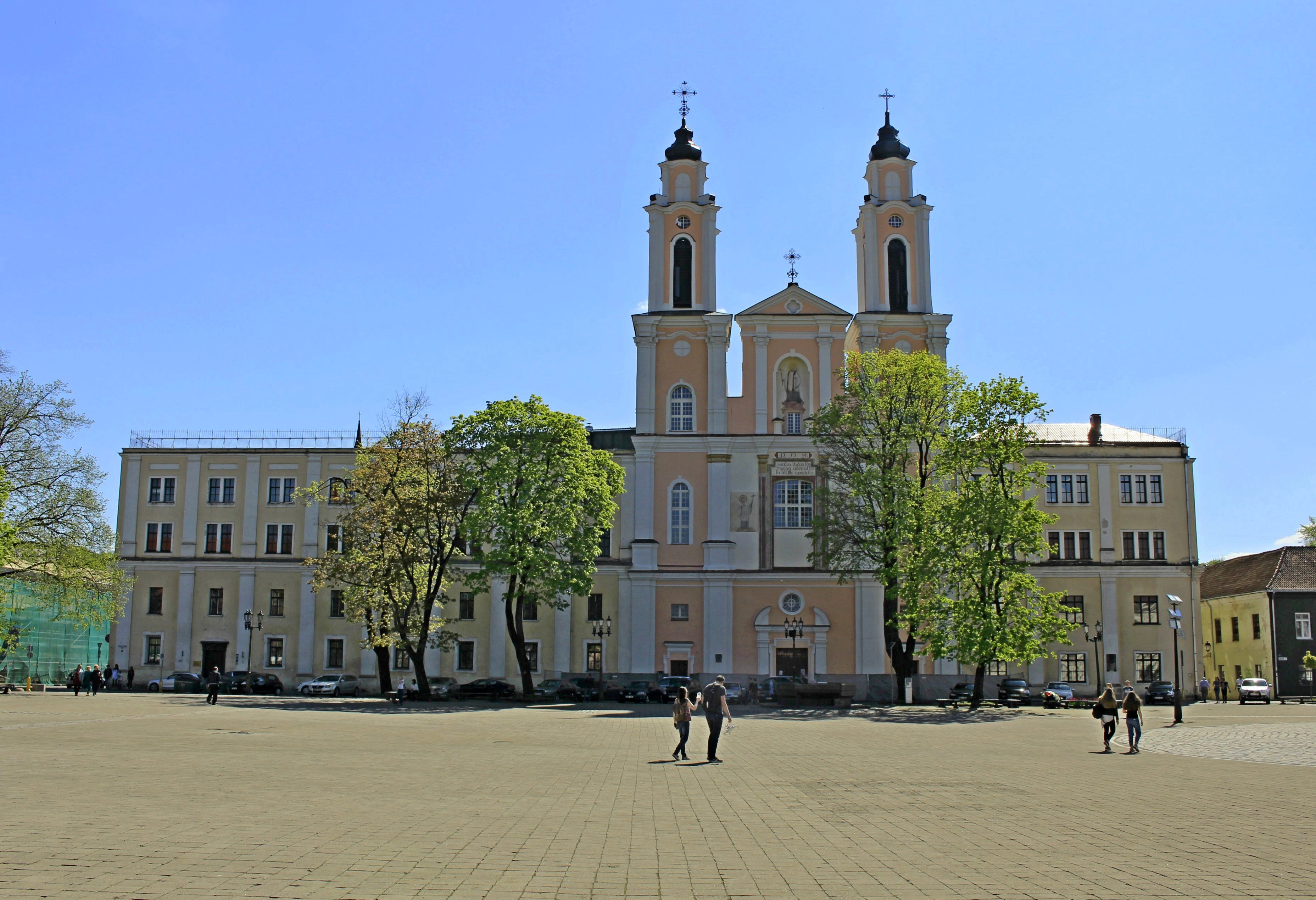 Kauno Šv. Pranciškaus Ksavero bažnyčia